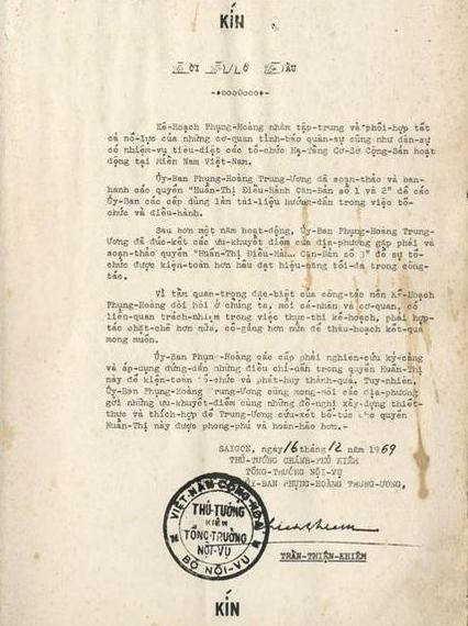 Trang đầu bản "Kế hoạch Chiến dịch Phụng Hoàng" do Thủ tướng Chính phủ kiêm Tổng trưởng Nội vụ Việt Nam Cộng hòa ký ban hành